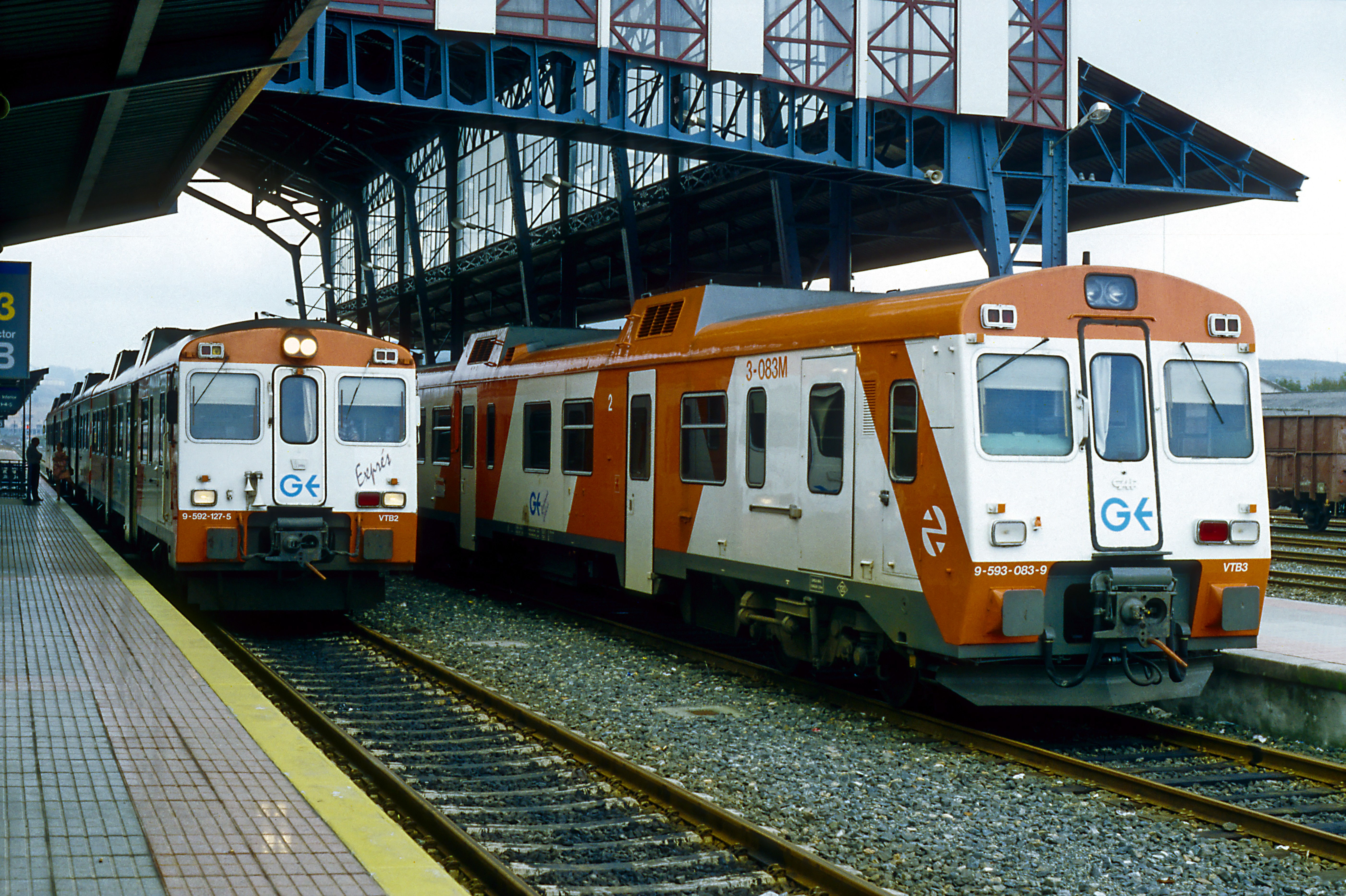 Dieseltriebzüge der Reihen 592 und 593 im wagenbaulichen Ursprungszustand, erkennbar an den später entfernten Stirnwandtüren. Äußerlich außer an der Höhe dieser Stirnwandtüren kaum zu unterscheiden, doch mit vollkommen unterschiedlichen Antrieben ausgerüstet.